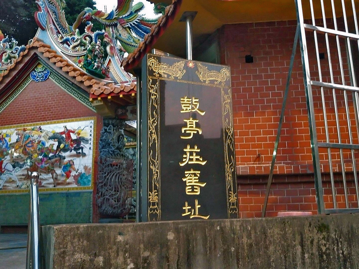 碑立於長慶廟邊，正面臨牯嶺街95巷，標示「鼓亭莊舊址」五字。